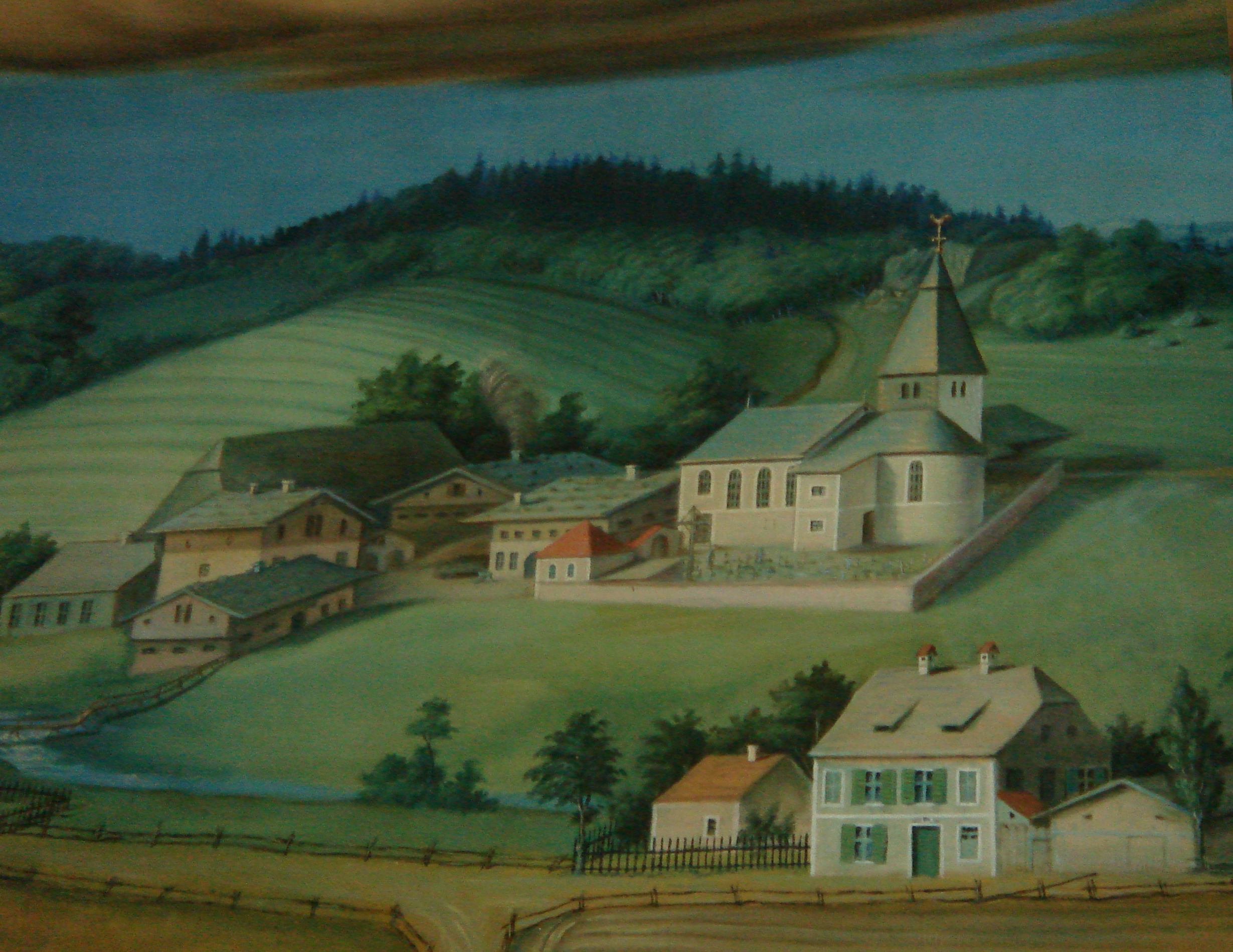 Achslach um das Jahr 1866. Ausschnitt aus dem von Georg Aichinger gemalten Hochaltarblatt in der Pfarrkirche St. Jakobus.